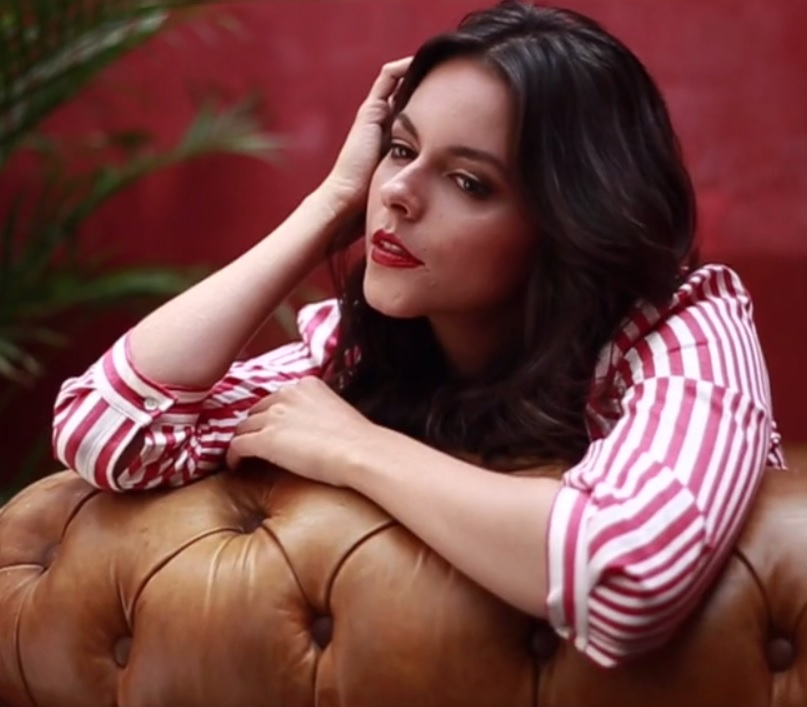 Julieth Restrepo en sesión fotográfica en 2017